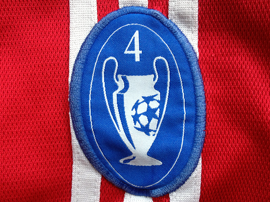 Blaues Ehrenwappen (Champions-League-Pokal und die Anzahl der Siege) auf dem Ärmel des Trikots (Bei FC Bayern, 2002).